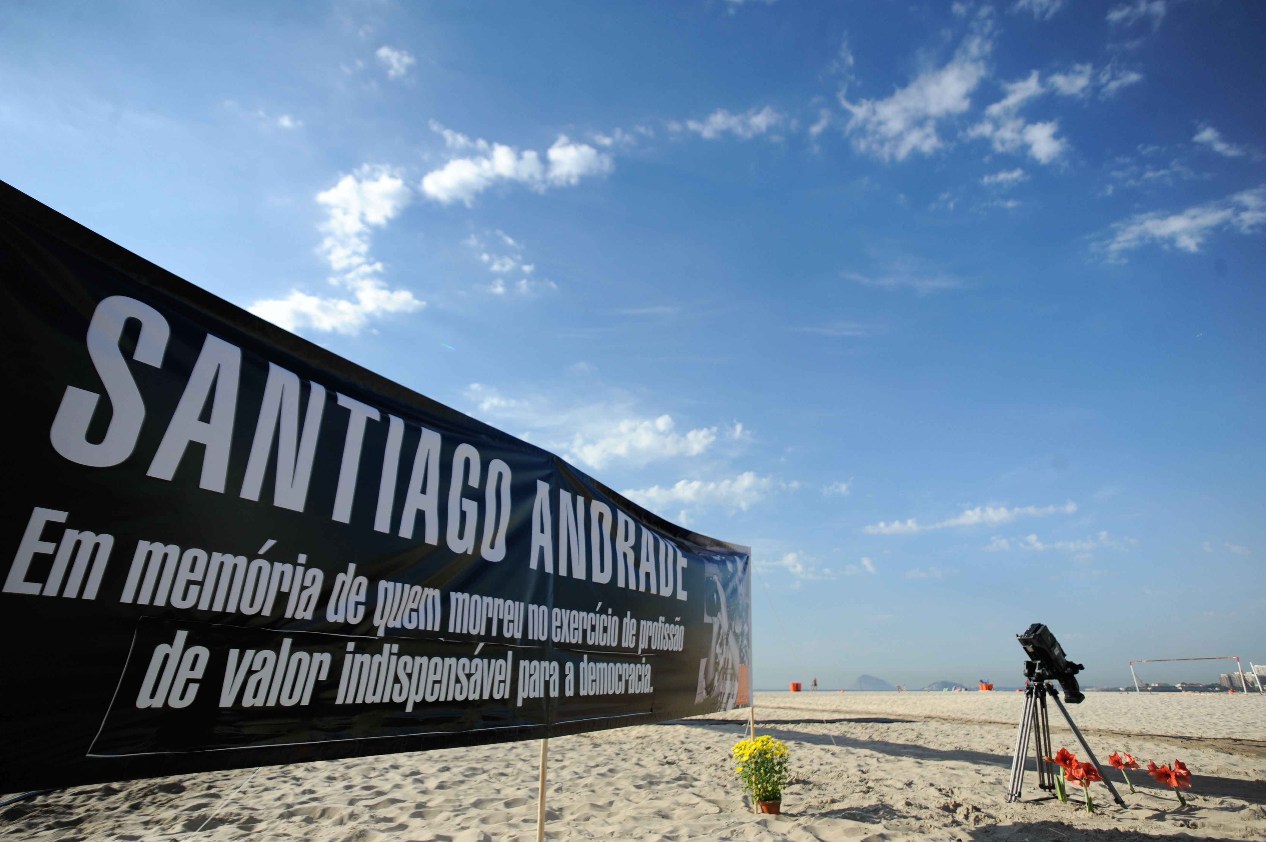 Rio da Paz homenageia cinegrafista Santiago Andrade